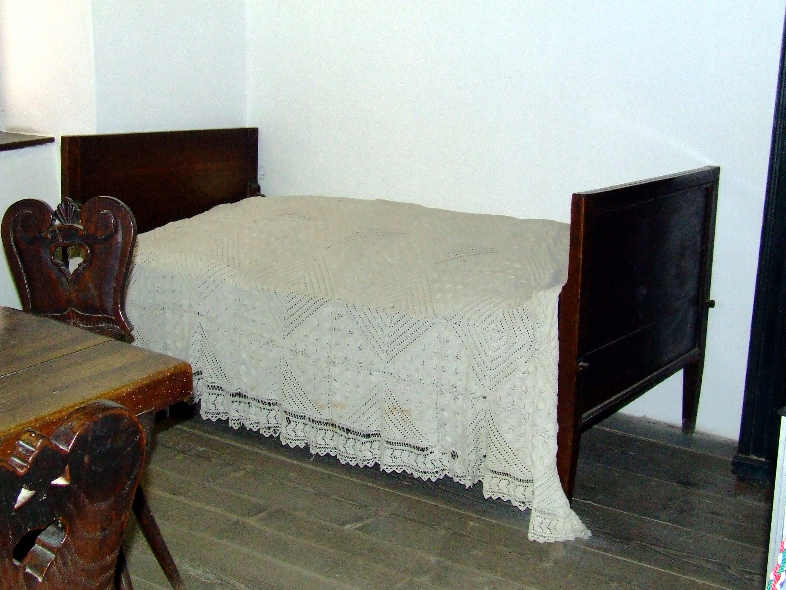 Petőfi Szülőház és Emlékmúzeum, Kiskőrös. Az ágy 1846-ig volt a család birtokában, ekkor adósságuk fejében Dömsödön hagyták